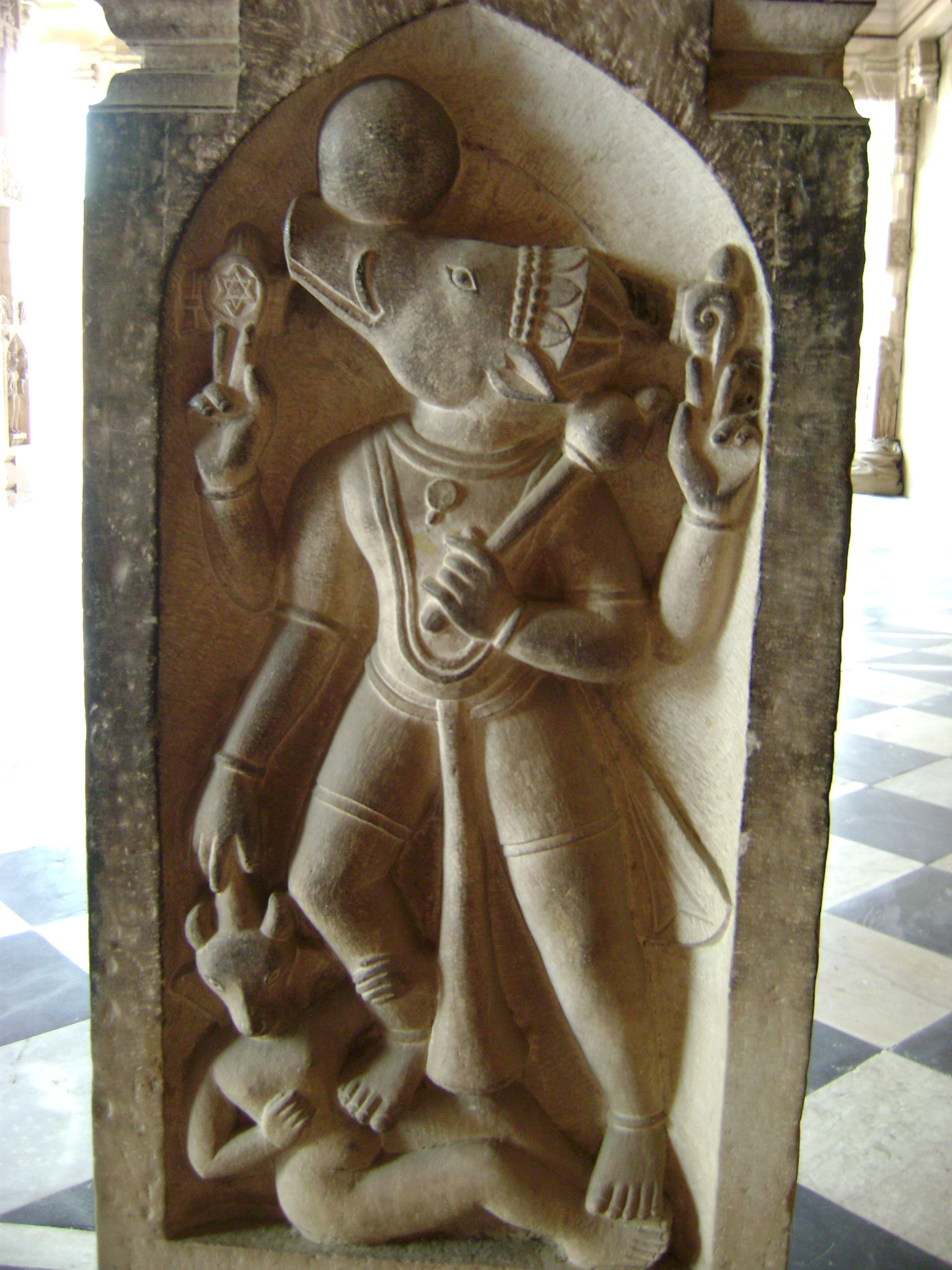 Varagha Avatar of Lord Vishu